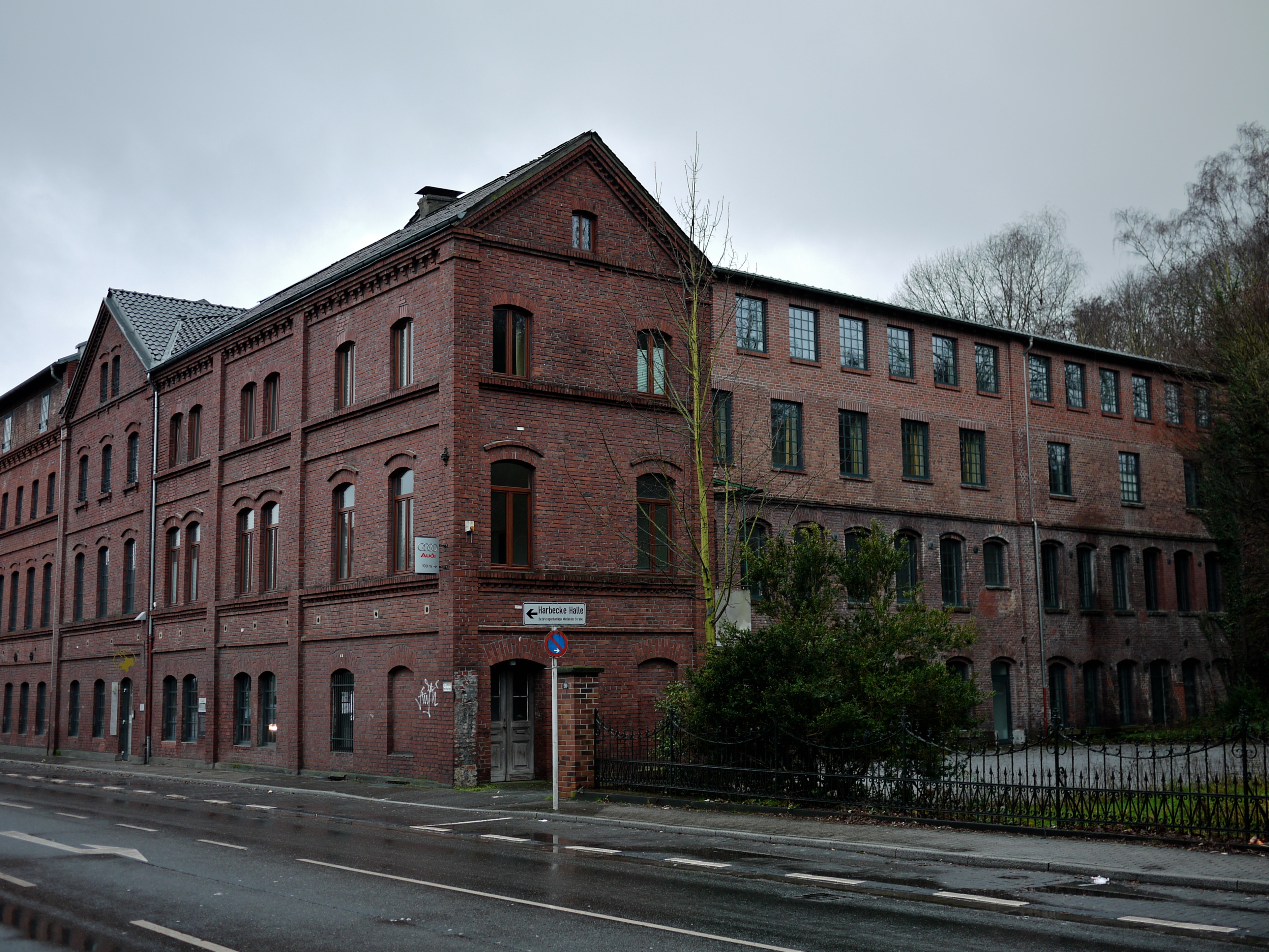 Leder- und Gerbermuseum, ehem. Lederfabrik Carl Abel, Düsseldorfer Straße 269, Mülheim an der Ruhr